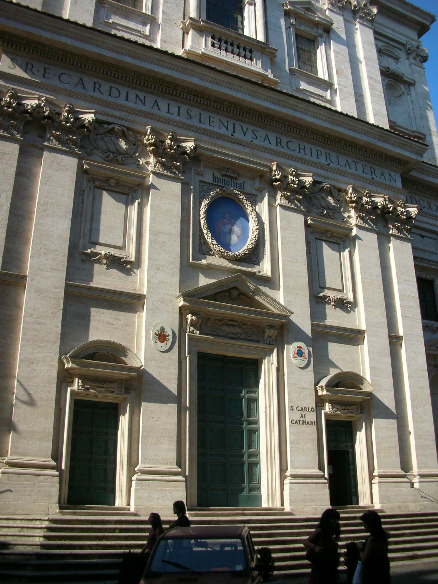 Façade, San Carlo ai Catinari, Rome